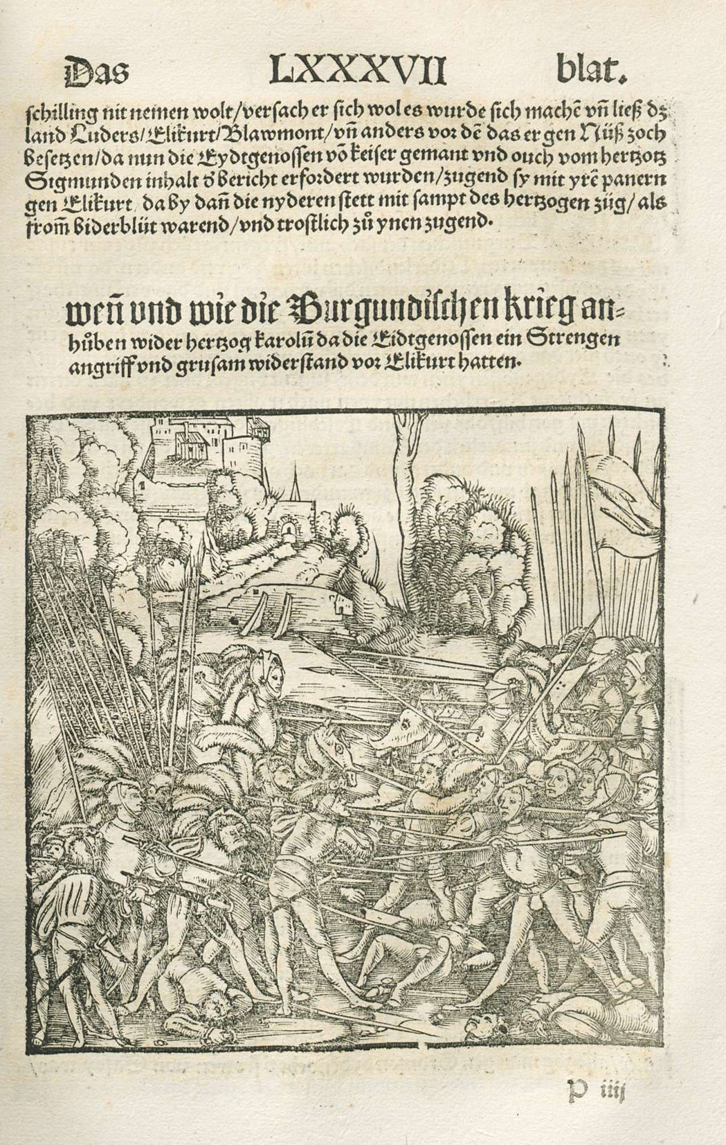 Petermann Etterlin: Kronica von der loblichen Eydtgnoschaft Jr harkommen vnd sust seltzam strittenn vnd geschichten, Basel, 1507 [VD16 E 4110], Blatt 87 zu den Burgunderkriegen